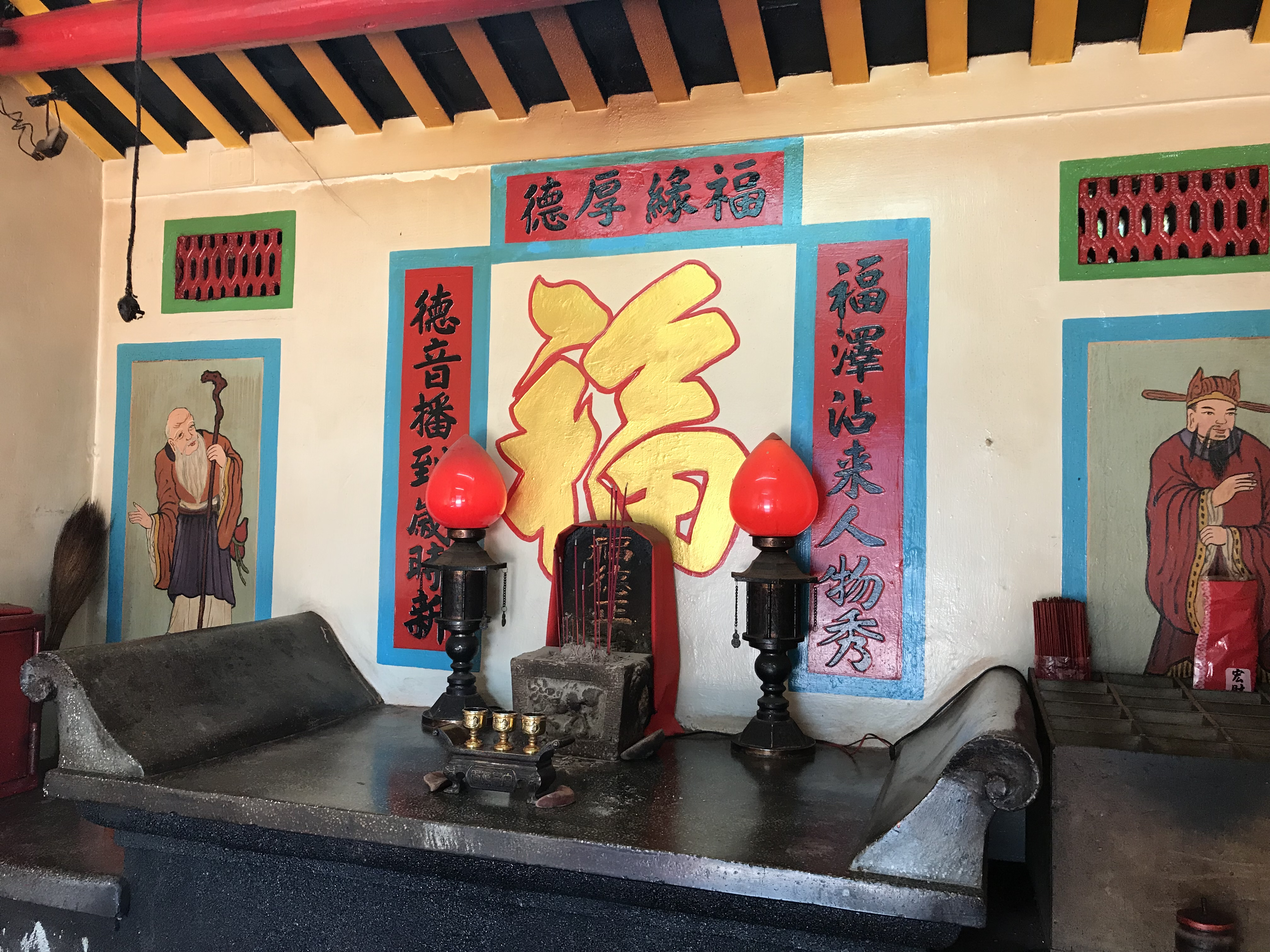 隘口伯公廣福宮內部牌位